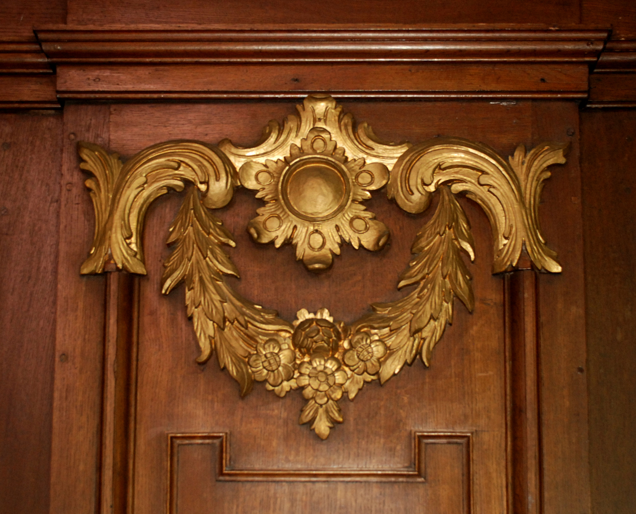 Belgique - Brabant wallon - Église de Court-Saint-Étienne